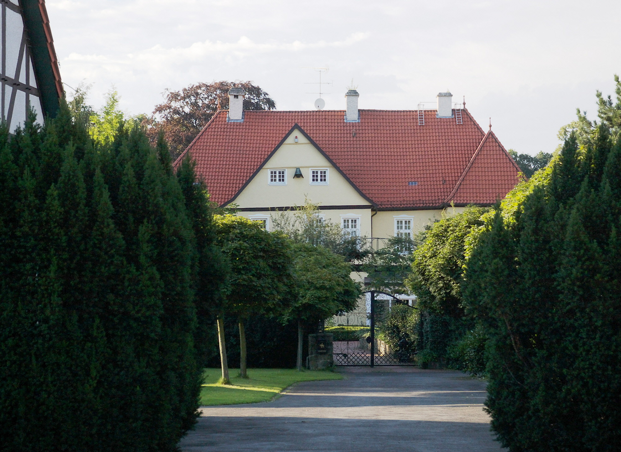 Eingangsbereich Haus Echthausen, Wasserschloß in Wickede (Ruhr)